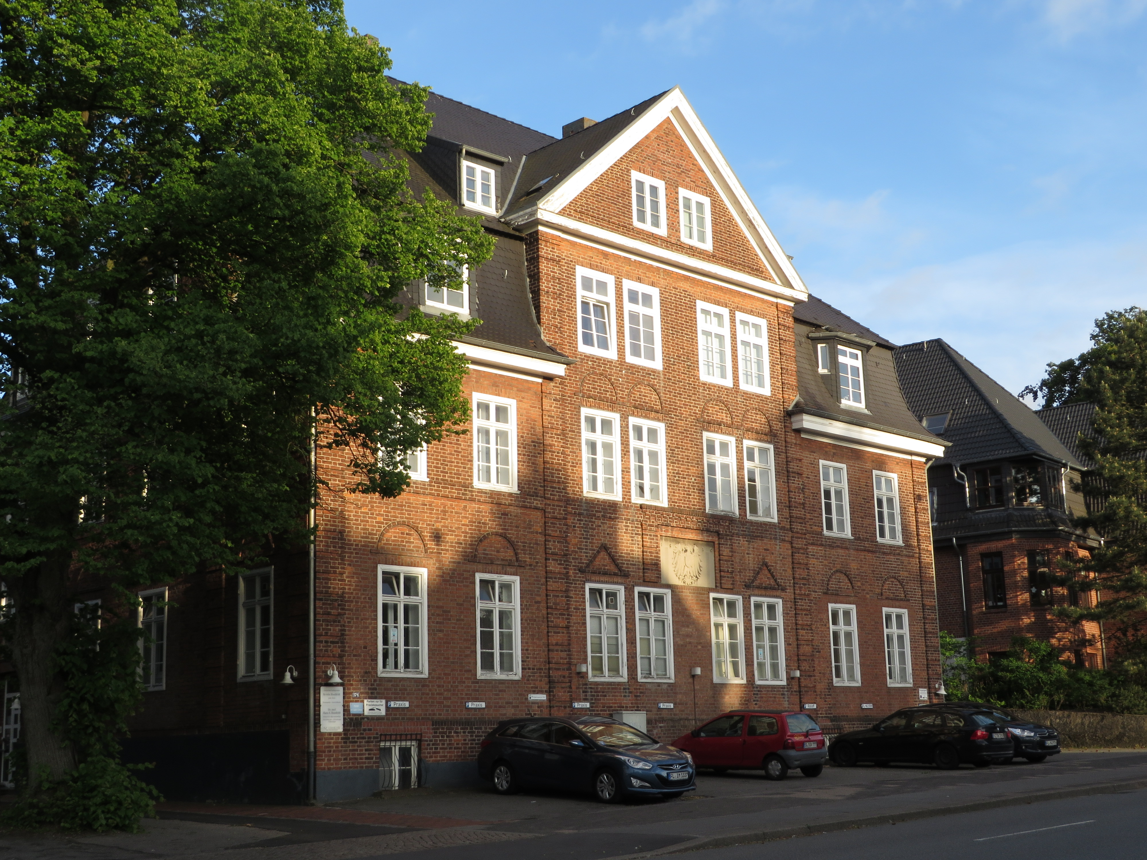 Kaiserliche Post beziehungsweise Alte Mürwiker Post, Mürwiker Straße 174, (Flensburg 2014)